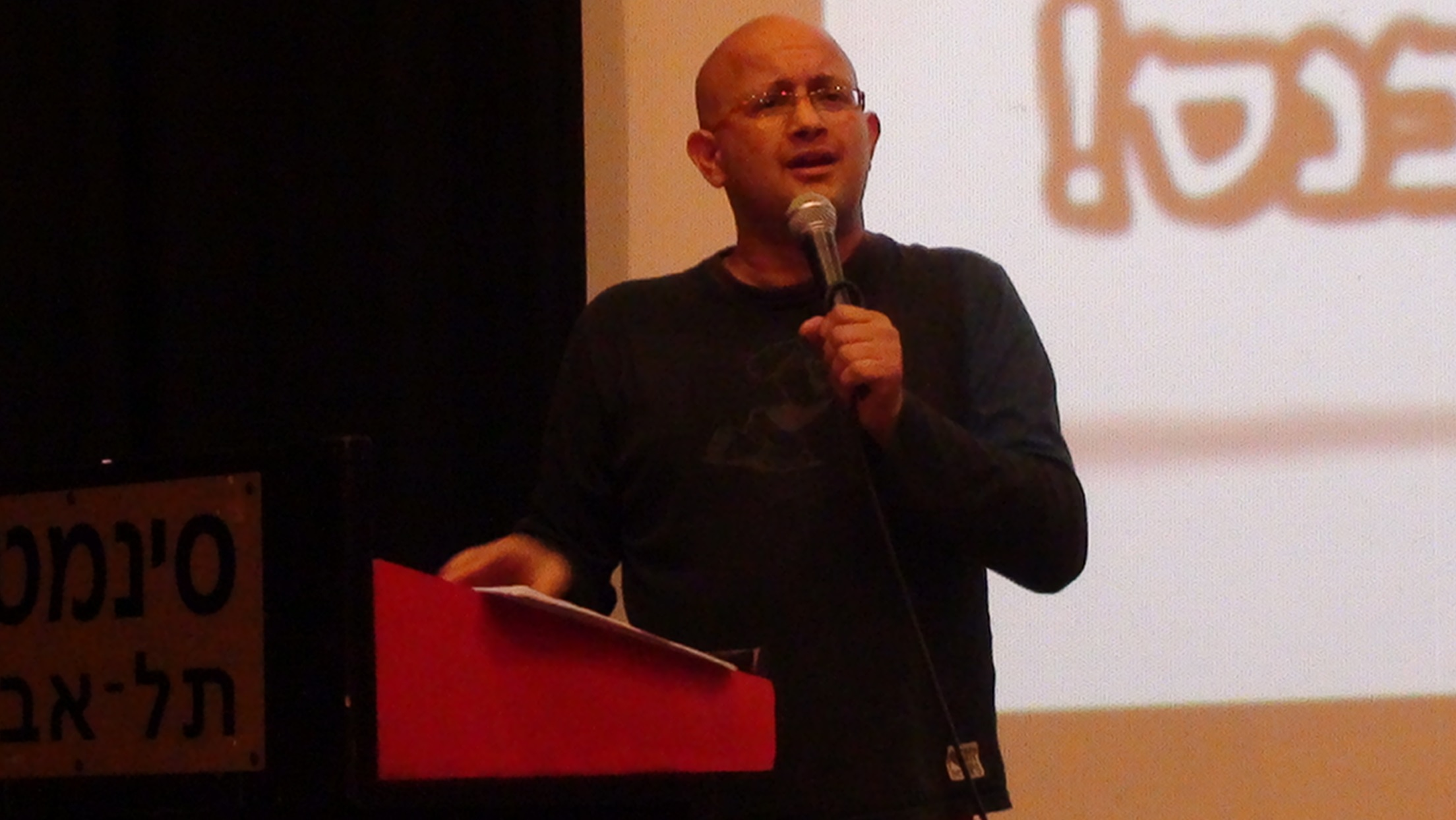 אלון גור אריה בהרצאה